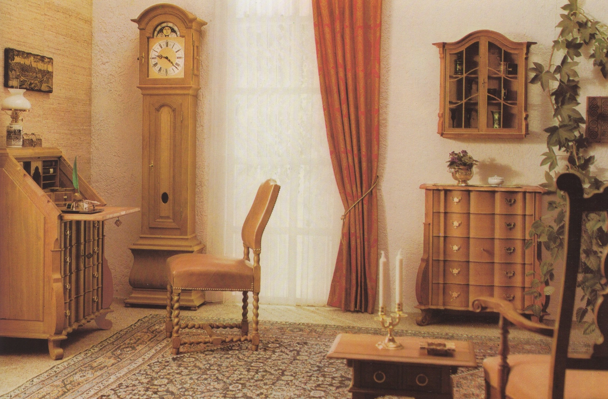 Einzelmöbel in Holländisch Barock, in Wellen gewölbte Frontpartien, massive Eiche geräuchert und gewachst